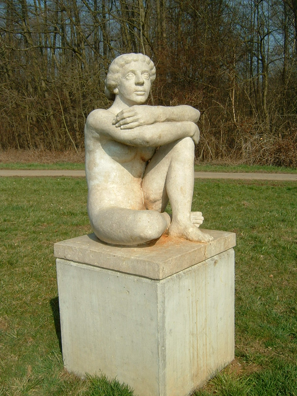 Skulptur Sitzende von Willi Schmidt in Schwalbach (Nähe Waldfriedhof)